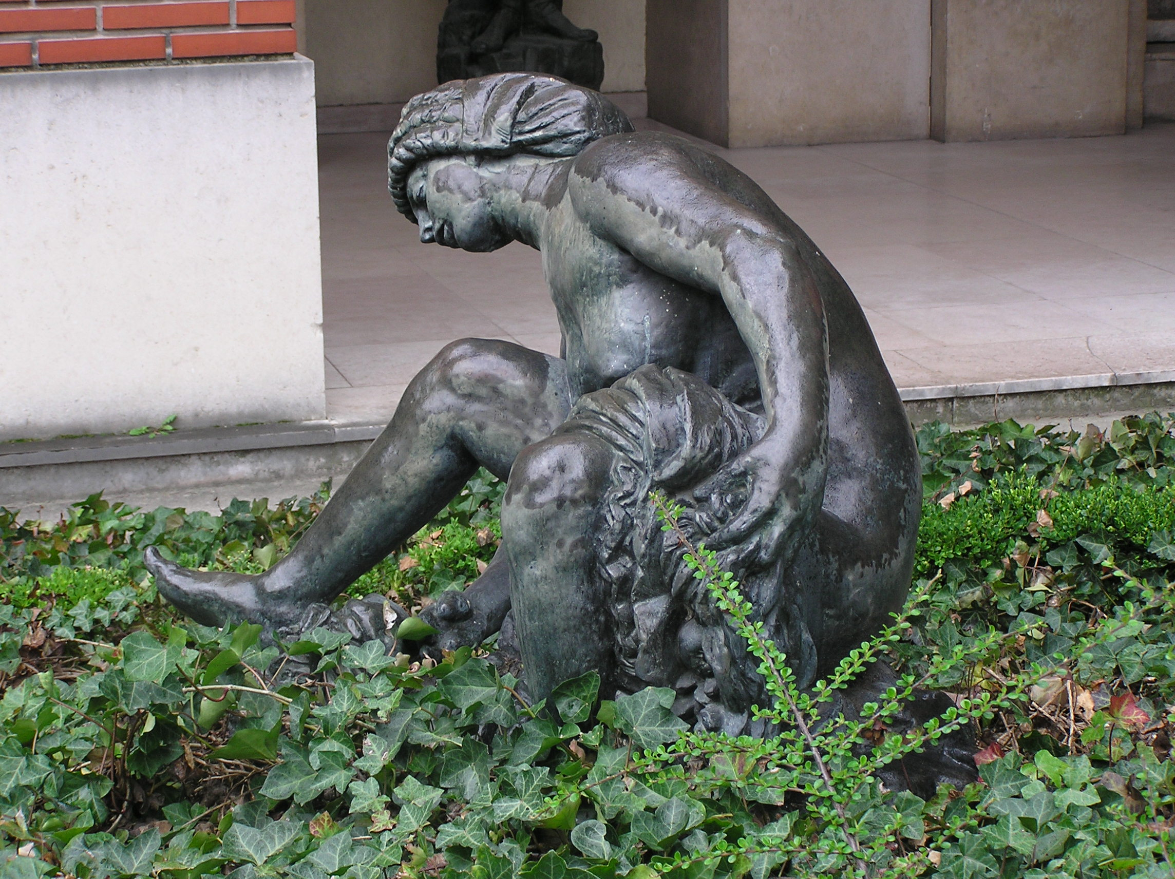 Sculpture du jardin sur rue du Musée Bourdelle à Paris